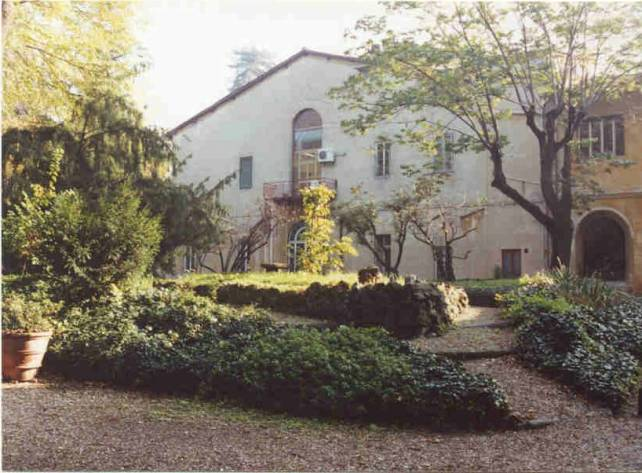 La montagnola, parte del Giardino dei Semplici di Firenze